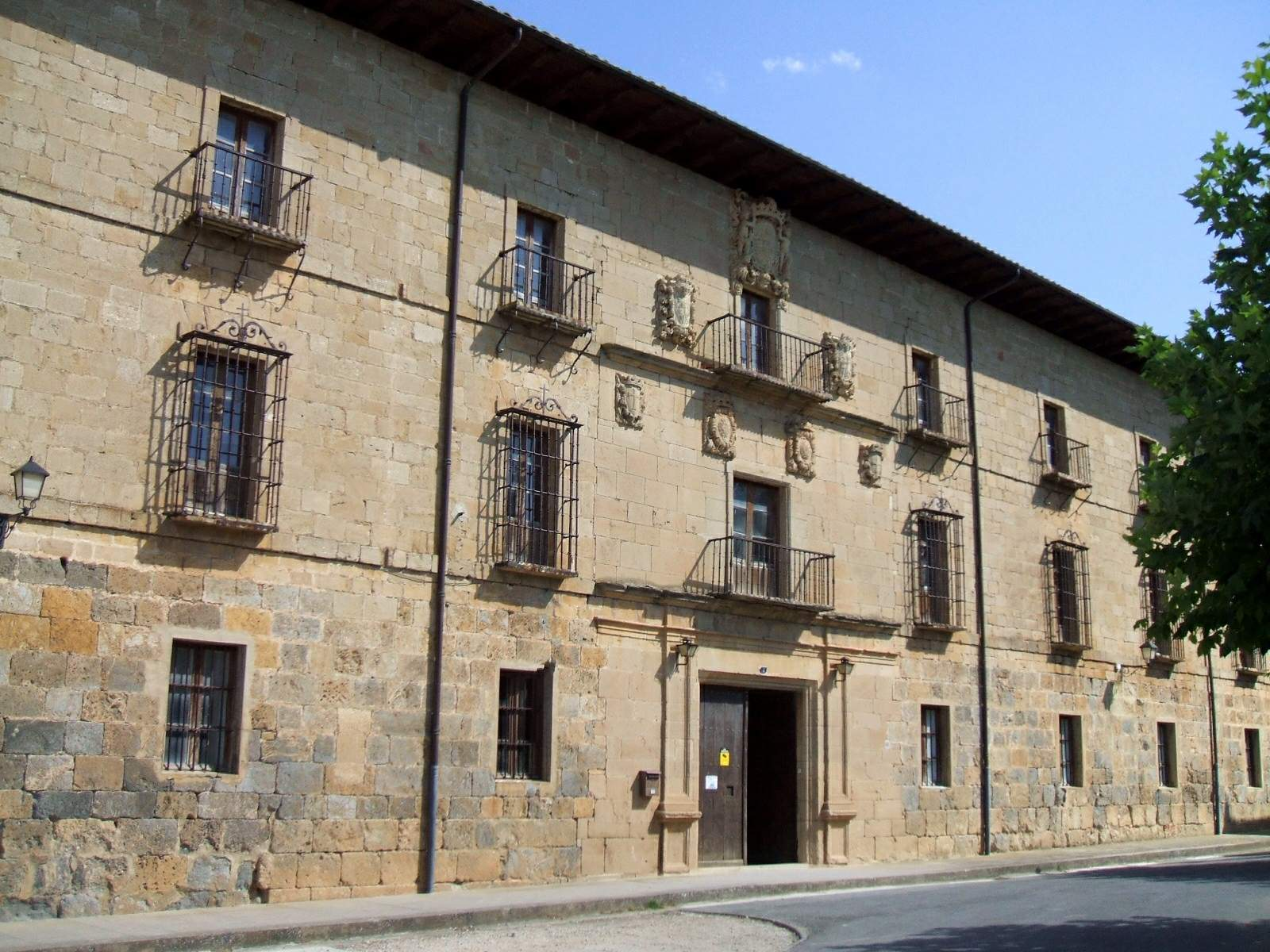 Monasterio de Santa María la Real de Irache (Navarra)